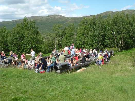 Pilegrimsvandrere ved Vesle-Hjerkinn på dovrefjell